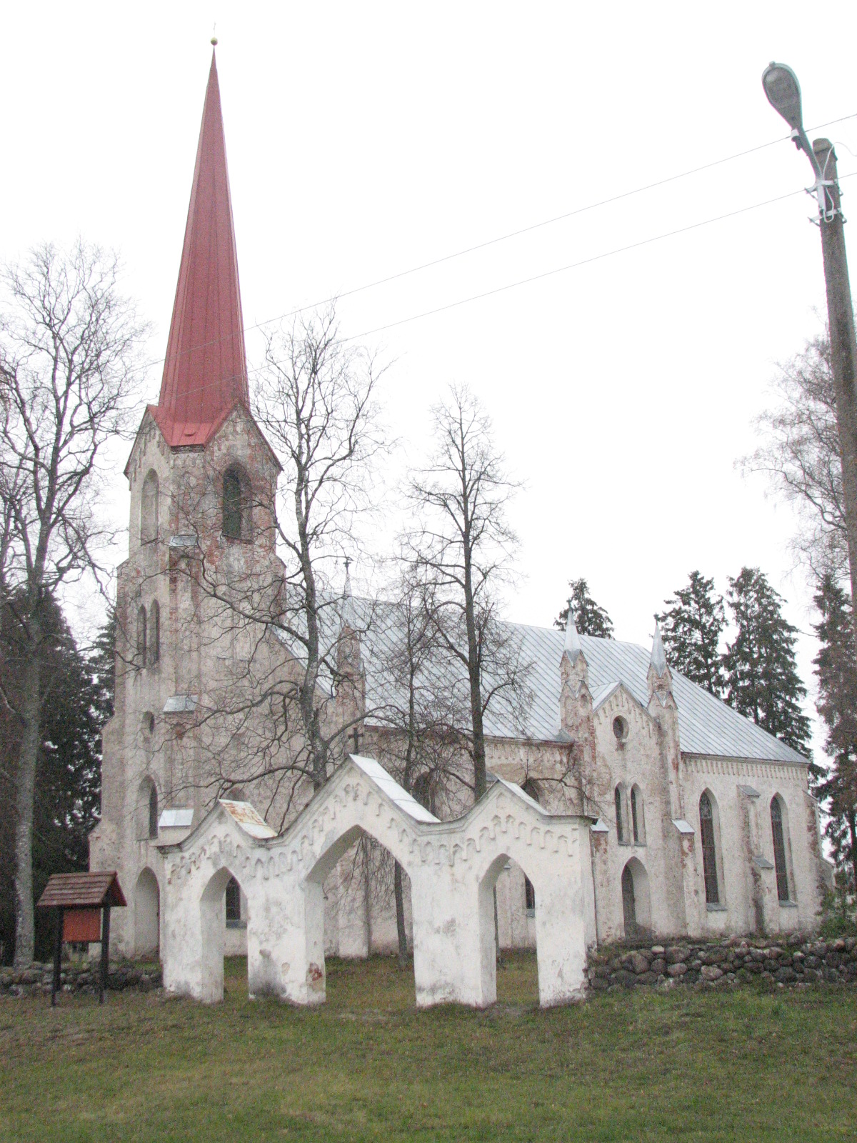 Lohusuu, Estonia